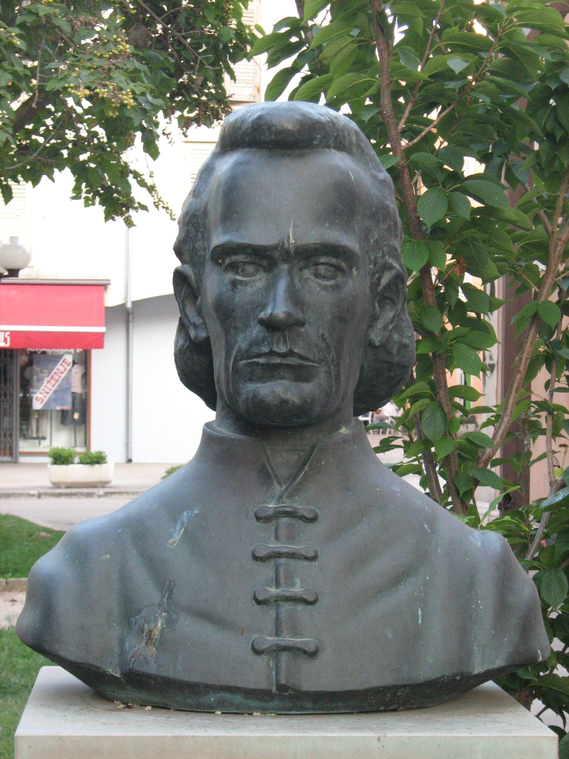 Mihovil Pavlinovic